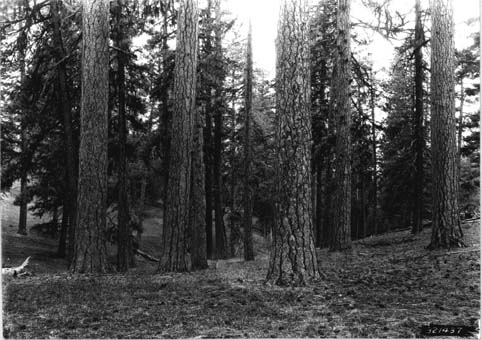 Pinus ponderosa.